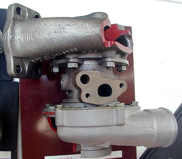 Abgas-Turbolader Pkw. im Technik-Museum Speyer